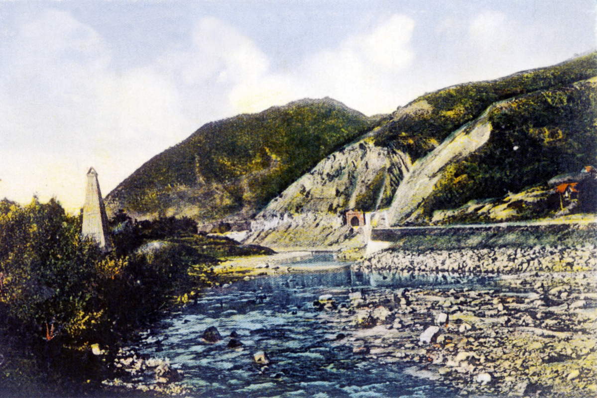 Tunelul și prima sondă cu foraj mecanic din România, Mosoare, Târgu Ocna.